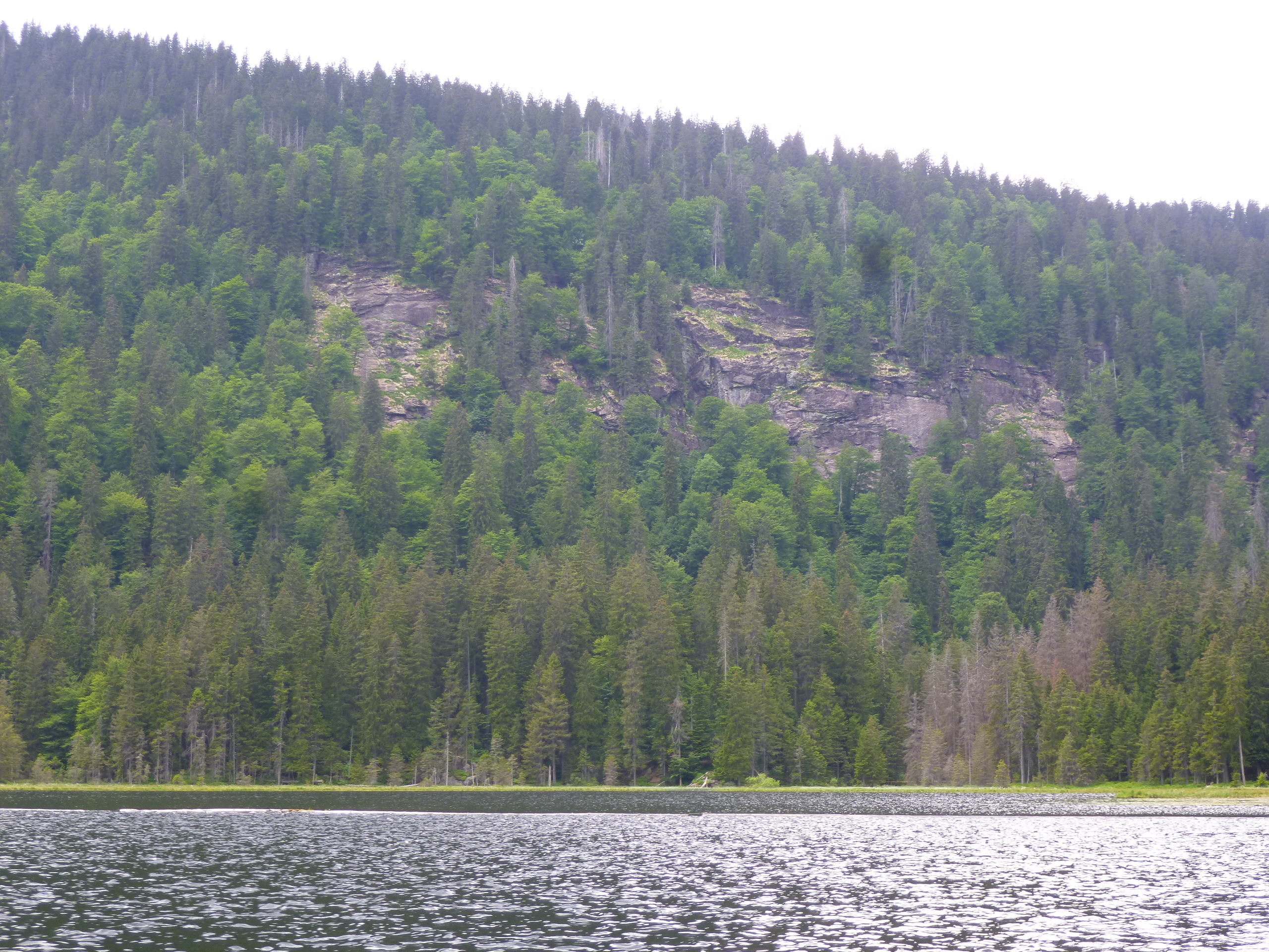 Blick über den Großen Arbersee mit Arberseewand im Hintergrund. Geotop im Landkreis Regen.